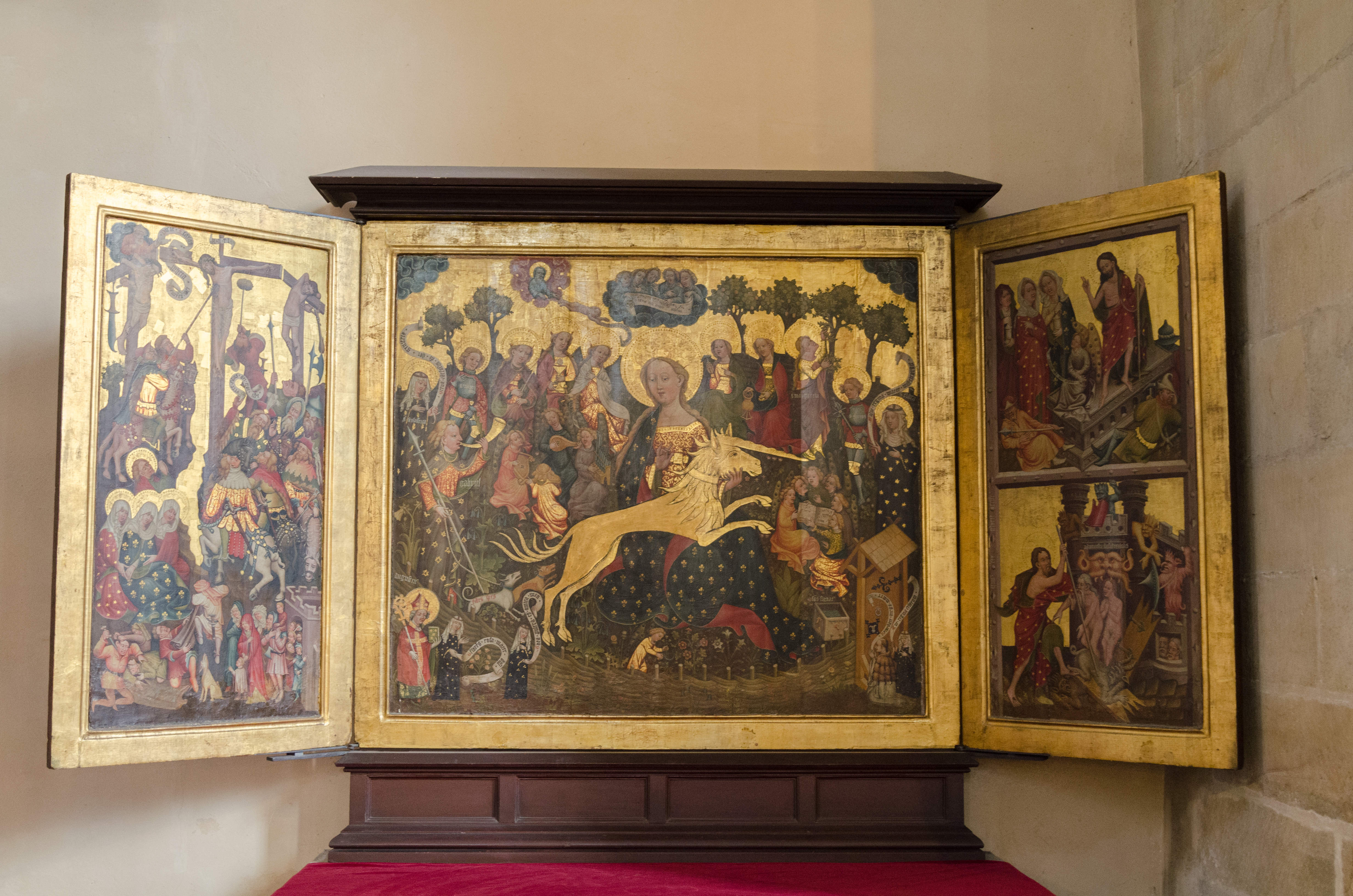 Erfurter Dom